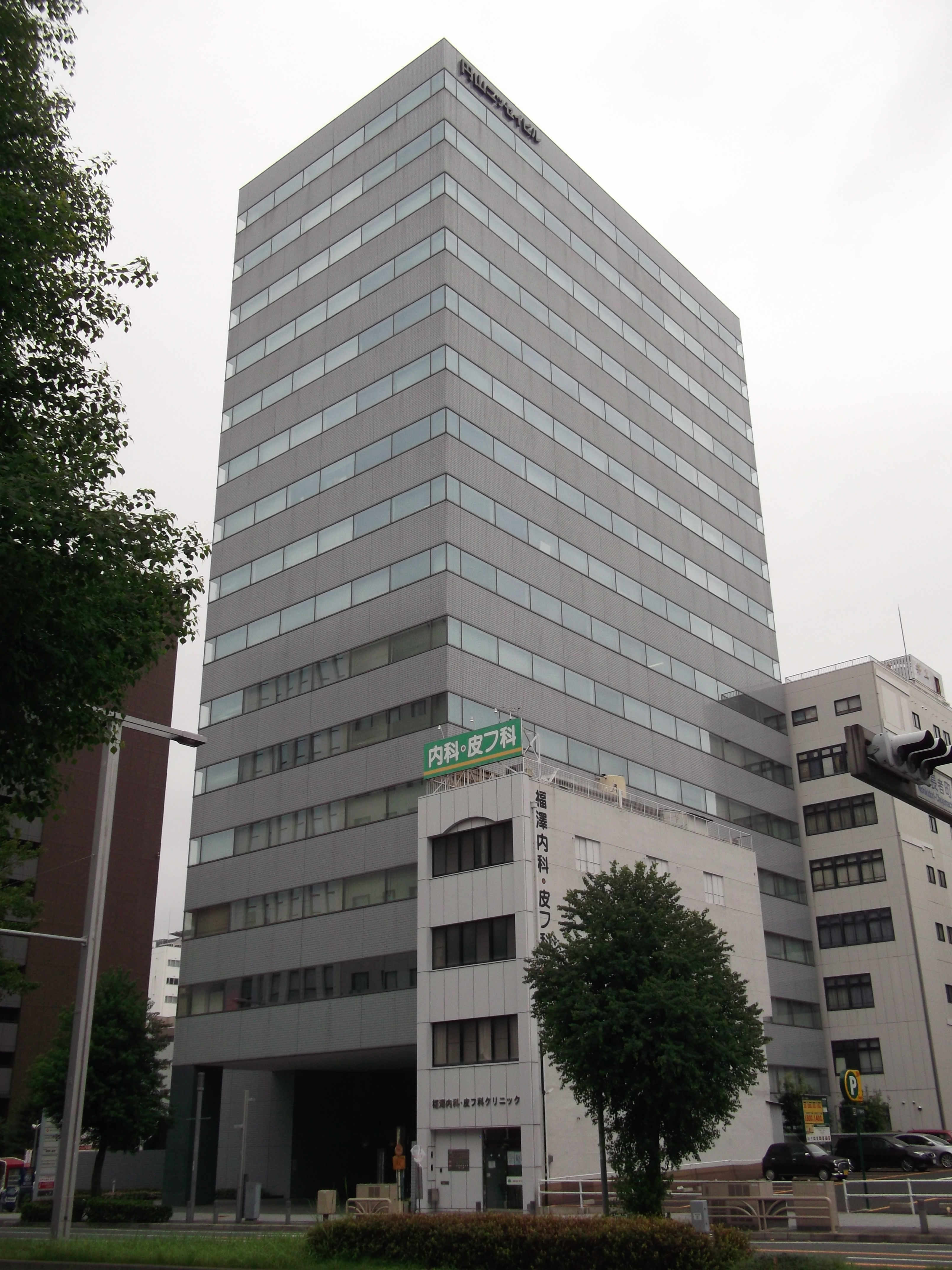 名古屋市中区錦二丁目の円山ニッセイビルを南側公道東側より撮影